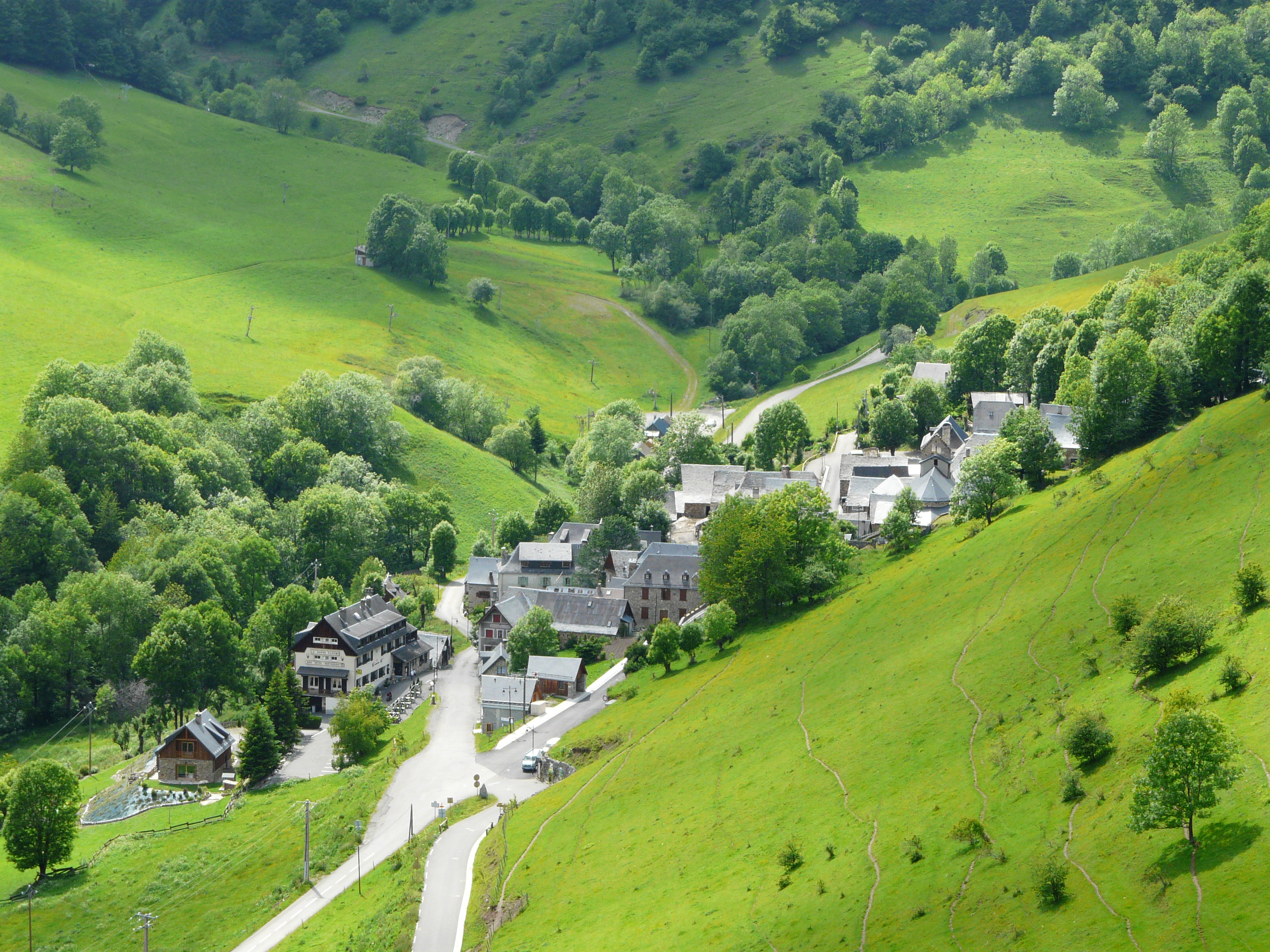 Le village de Bourg-d'Oueil vu depuis le nord-est, Haute-Garonne, France.